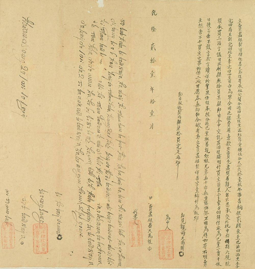 清乾隆21（1756）年灣裡社大馬役賣盡根契。